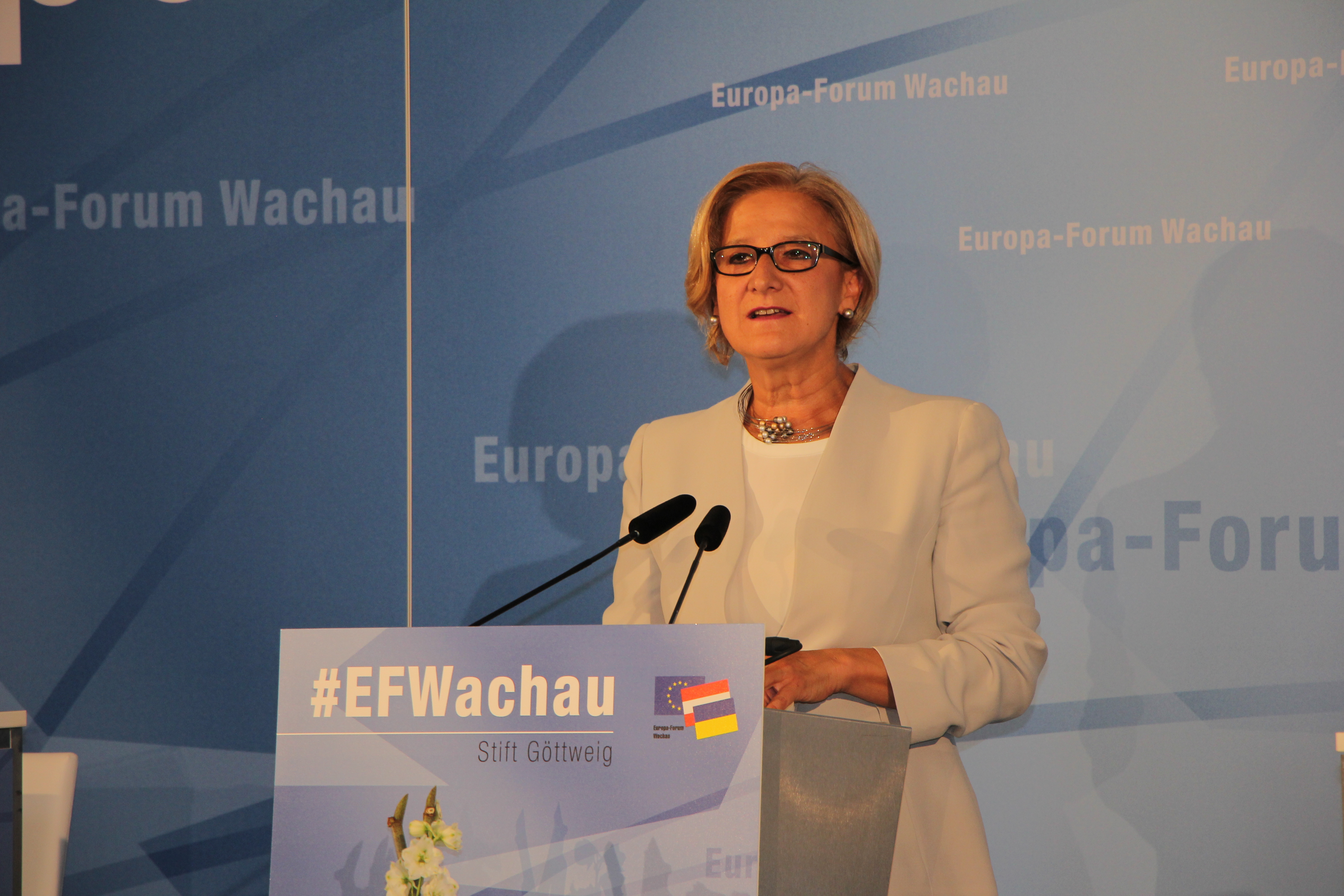 Europaforum Wachau 2018 auf Stift Göttweig